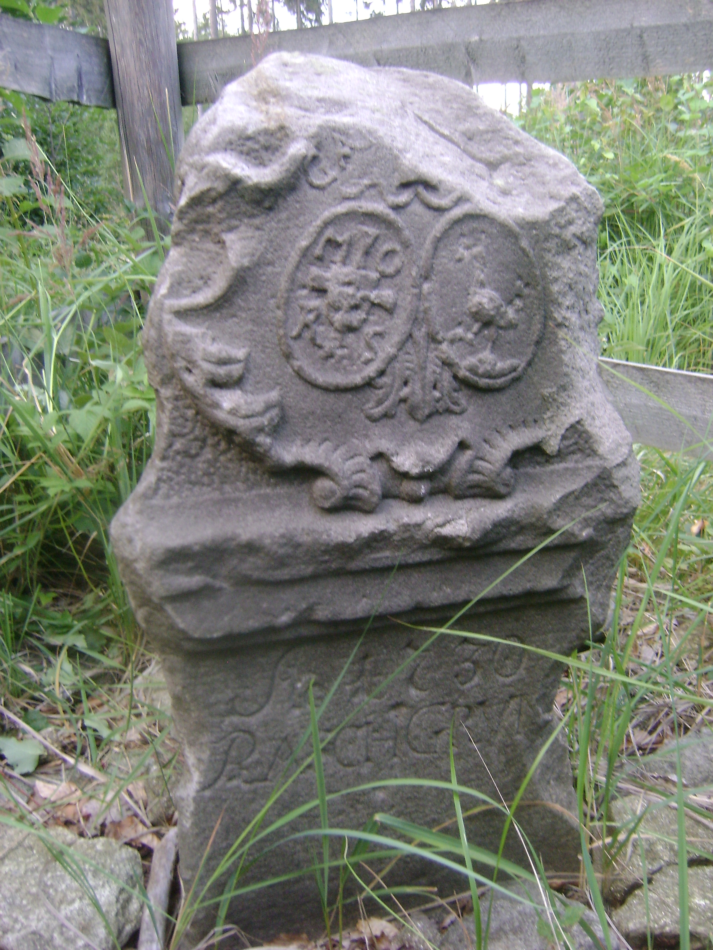 Kamień Trzech Granic na przełęczy Trzech Granic- Trójboczny kamień graniczny na zbiegu granic posiadłości trzech właściciel w południowo-zachodniej Polsce w Sudetach w Górach Sowich